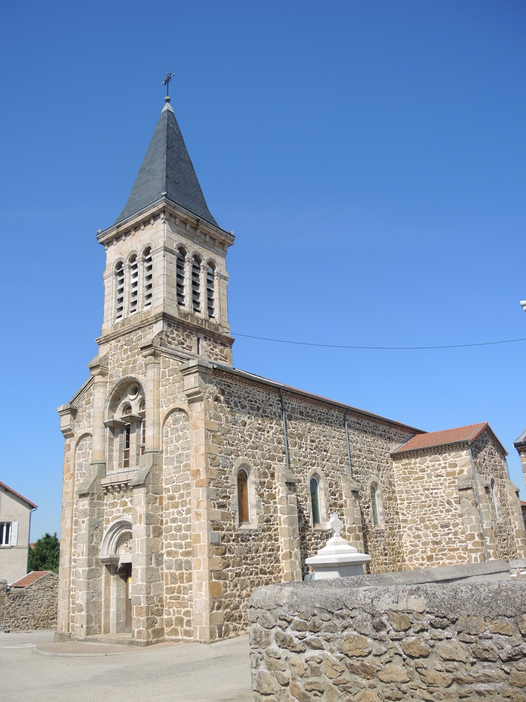 Bogy détail